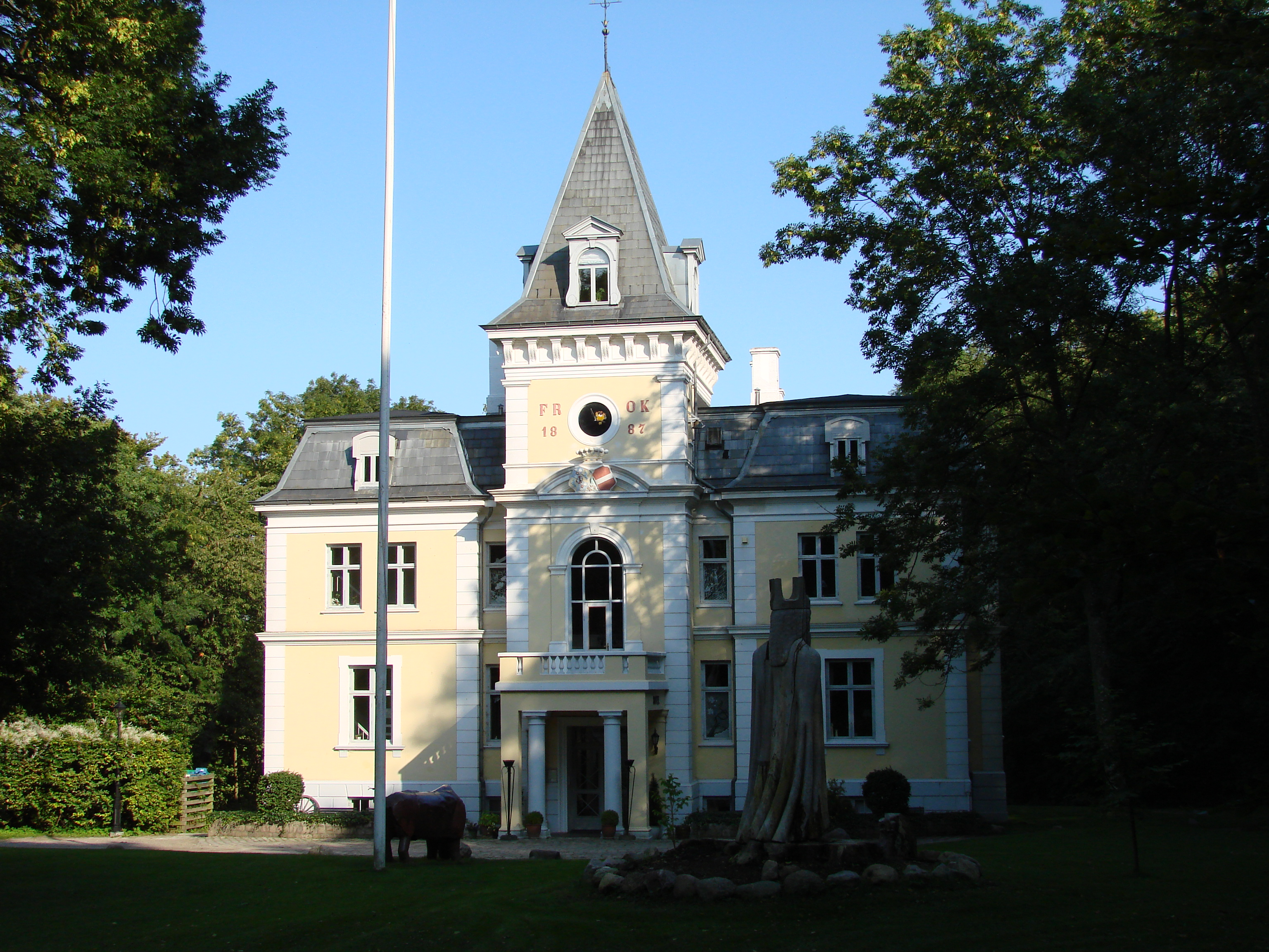 Liselund Ny Slot on Møn in Denmark